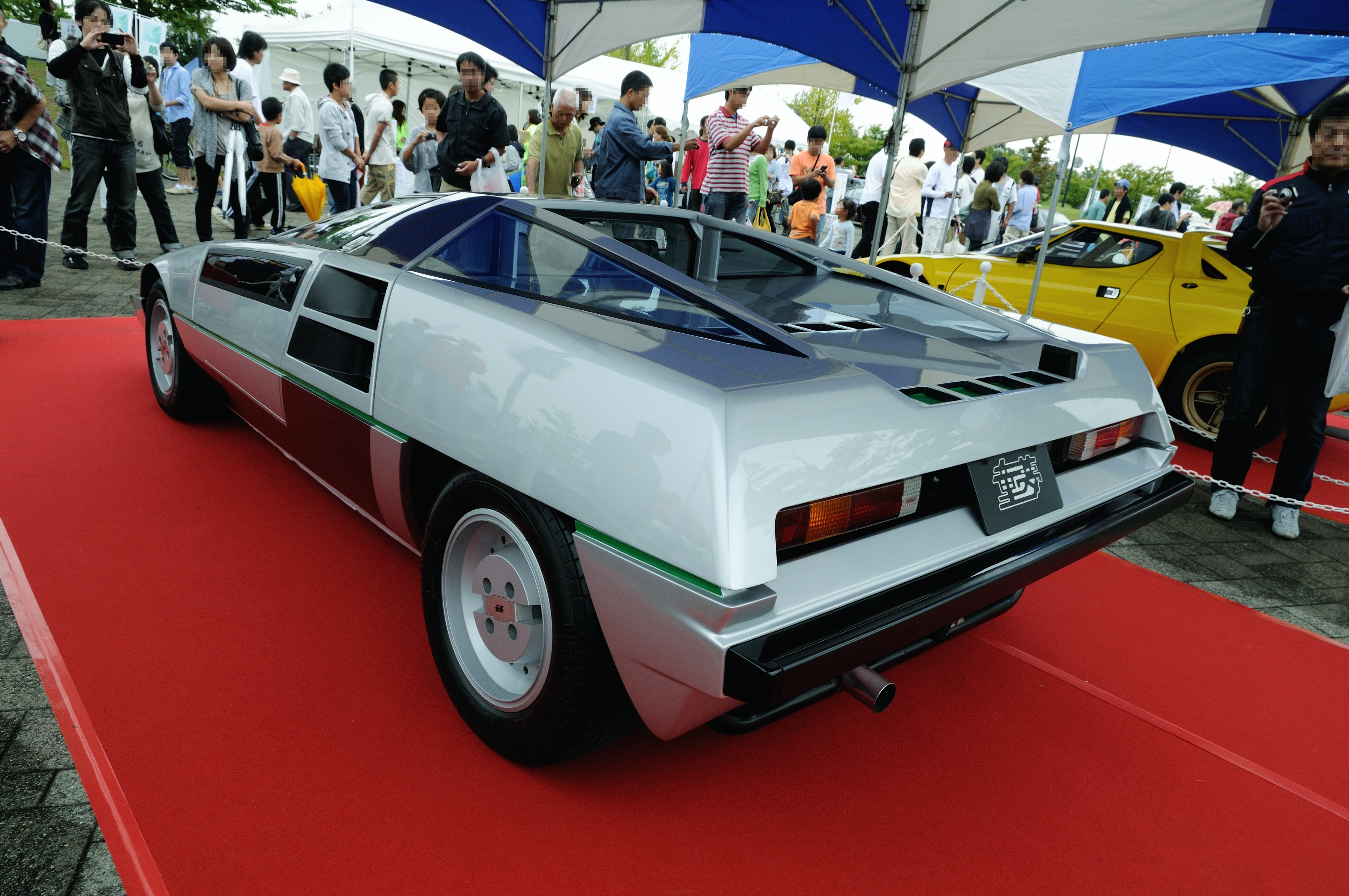 童夢-零(Dome Zero)